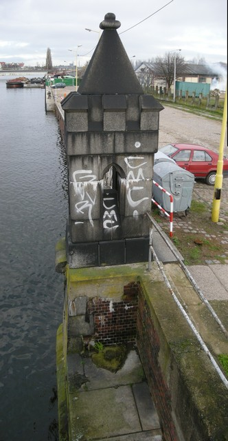 Pozostałości Mostu Dworcowego na Kępie Parnickiej (wieżyczka północna), Szczecin.